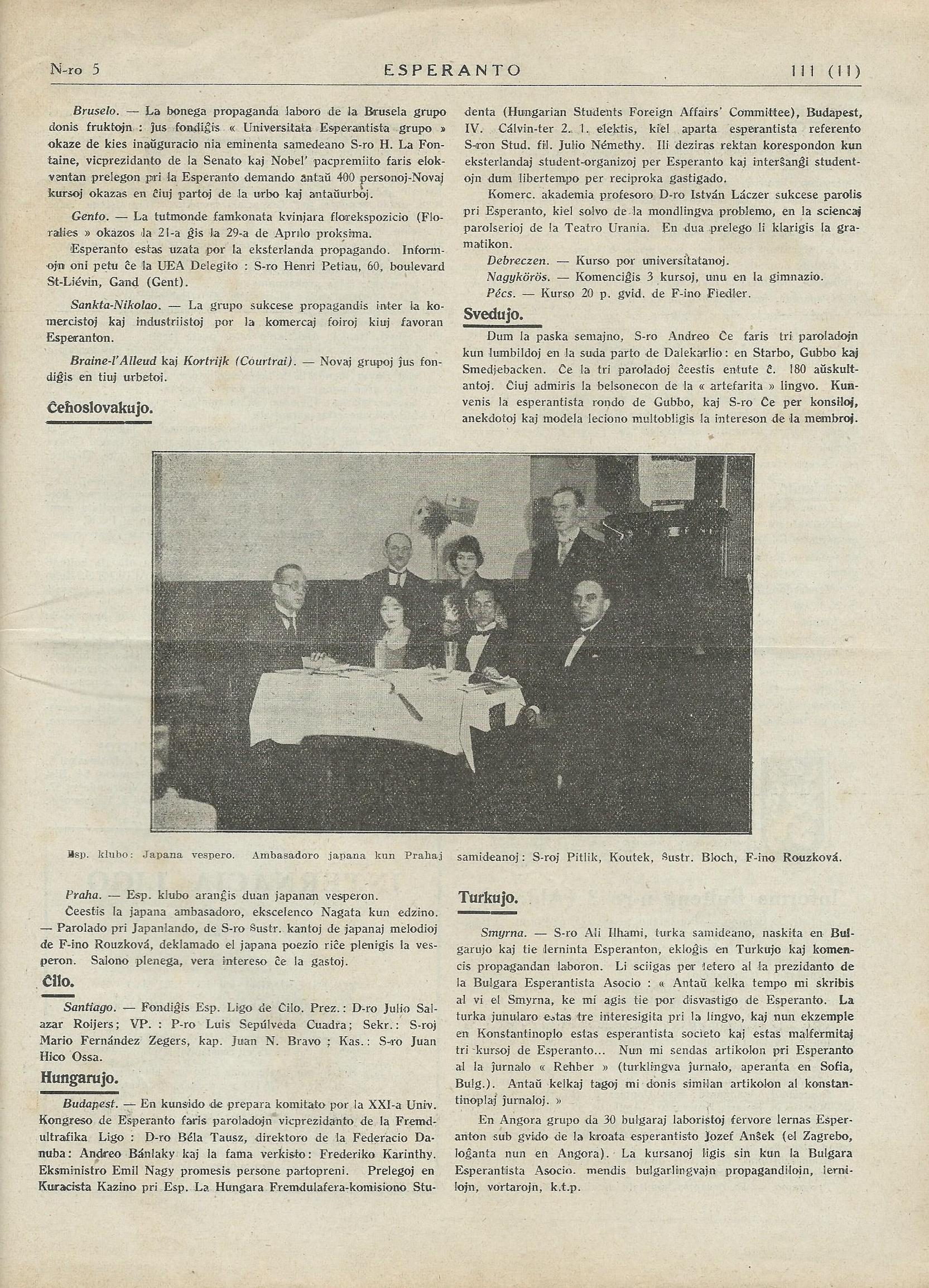 el la revuo "Esperanto", 1928